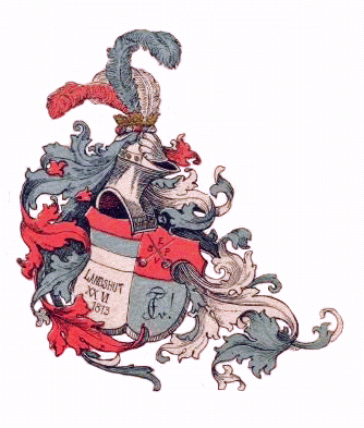 Das Wappen der Palatia. Die Farben (waagerecht): Hochrot, Königsblau, Silberweiß. Der Pälzer Waffenspruch: Ensit sit noster vindex! - Das Schwert sei unser Rächer! Das Stiftungsdatum in teilweise lateinischen Lettern: 20.06.1813. Der Pfälzer Zirkel: Circulus fratrum Palatiae vivat; vivat, crescat, floriat. - Der Kreis der Pfälzer Brüder lebe! Er lebe, wachse und gedeihe.